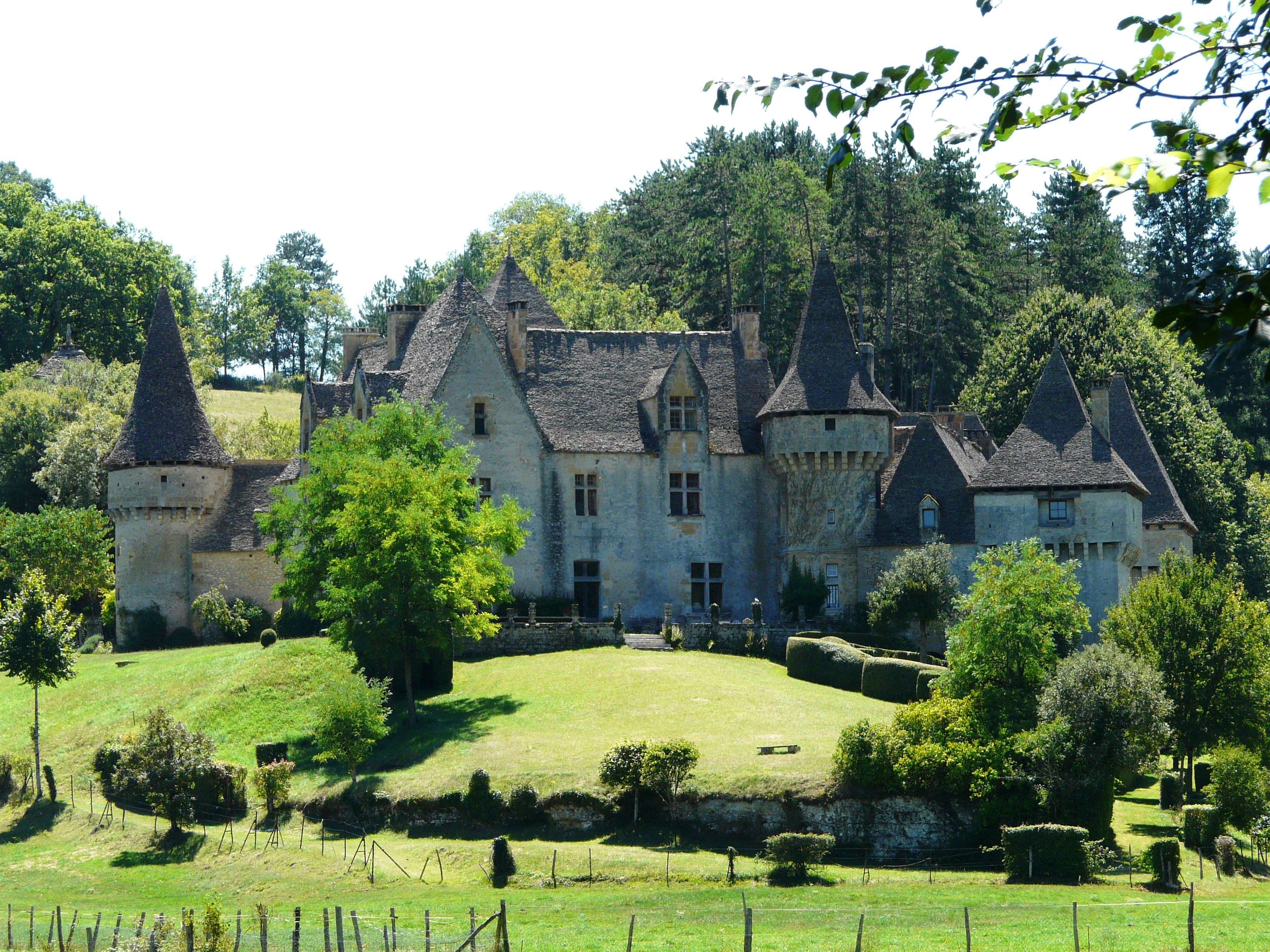 Le château de la Grande Filolie, Saint-Amand-de-Coly, Dordogne, France Object location45° 02′ 40″ N, 1° 12′ 38″ E